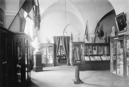 Benvenuto Bandieri, veduta del salone del Museo civico del Risorgimento (Modena) nell'allestimento del 1937